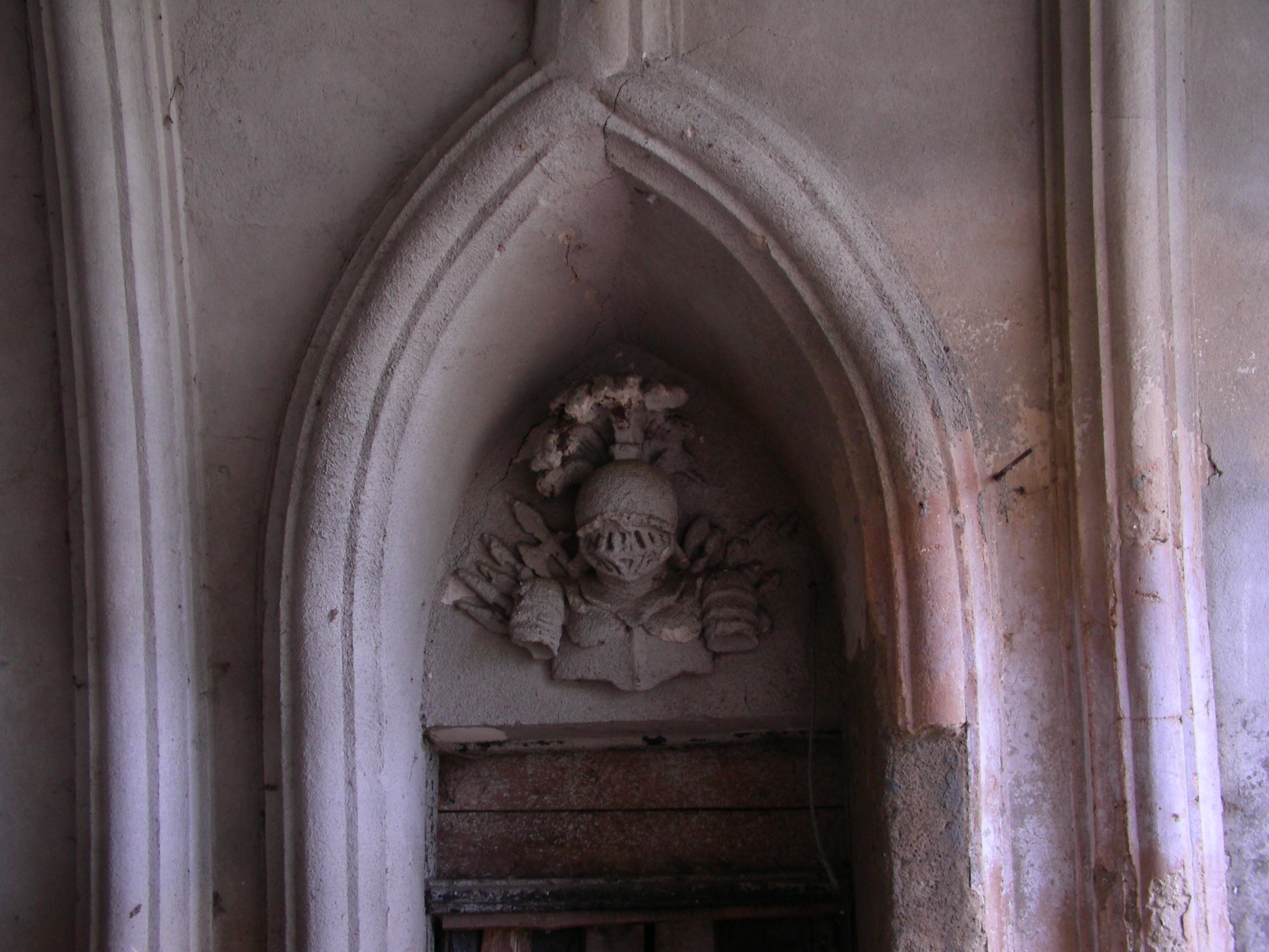 Беларуская (тарашкевіца): Сядзіба (уязная брама, стайні, сьвіран). в. Вялікая Ліпа This is a photo of Belarusian heritage monument. Reference number: 613Г000486 ( WLM)